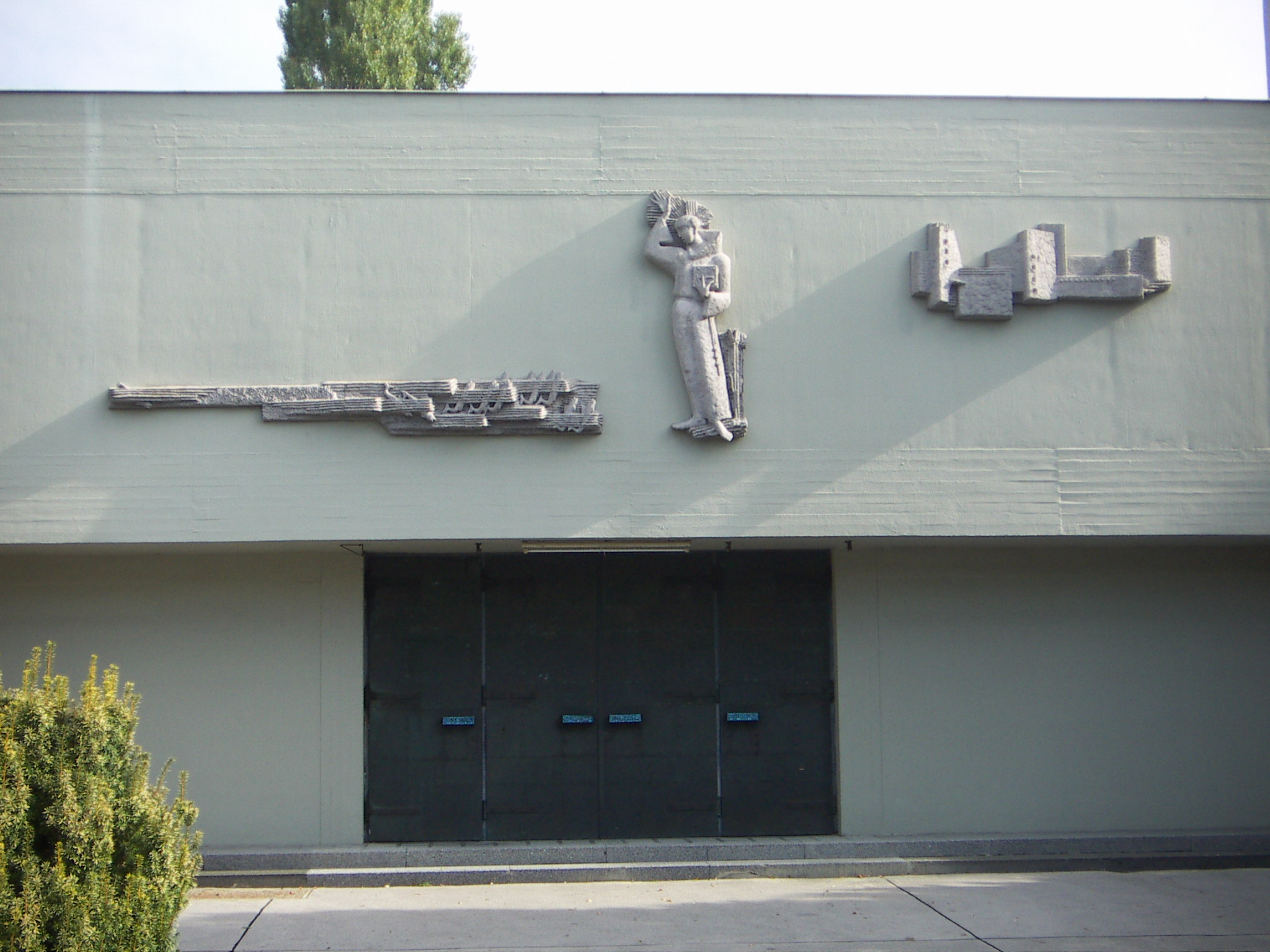 Pfarrkirche Schwarzlackenau, St.-Antonius-von-Padua-Kirche, in Wien, Bezirk Floridsdorf, Ortsteil Jedlesee, Siedlung Schwarzlackenau. Architekt: Leo Splett